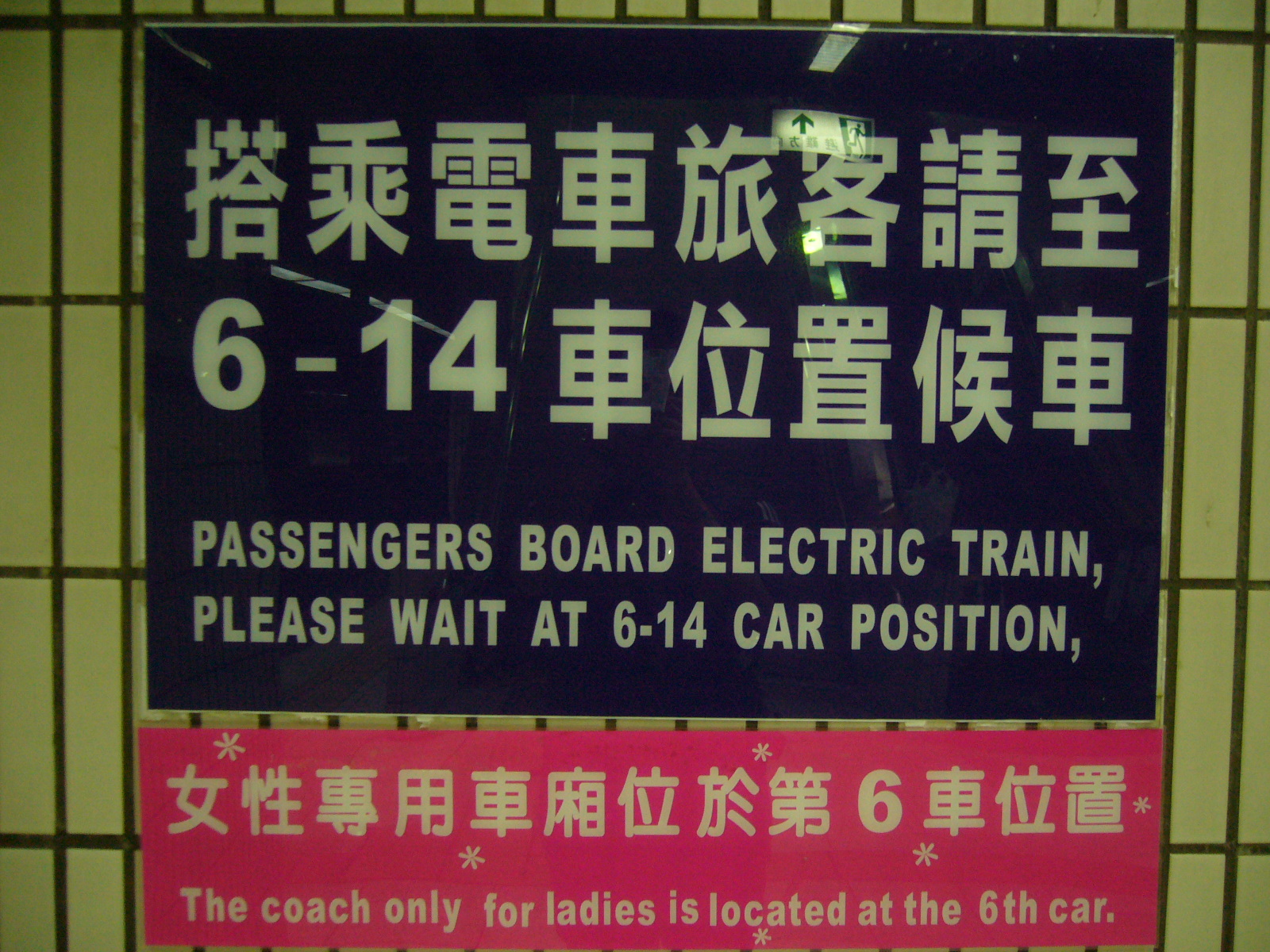 中文（台灣）: 台鐵台北車站月台通勤電聯車女性車廂位置標示牌